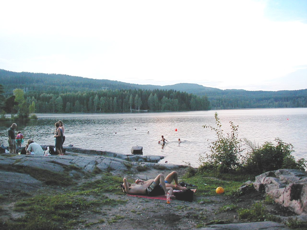 The lake Sognsvann in Oslo, Norway